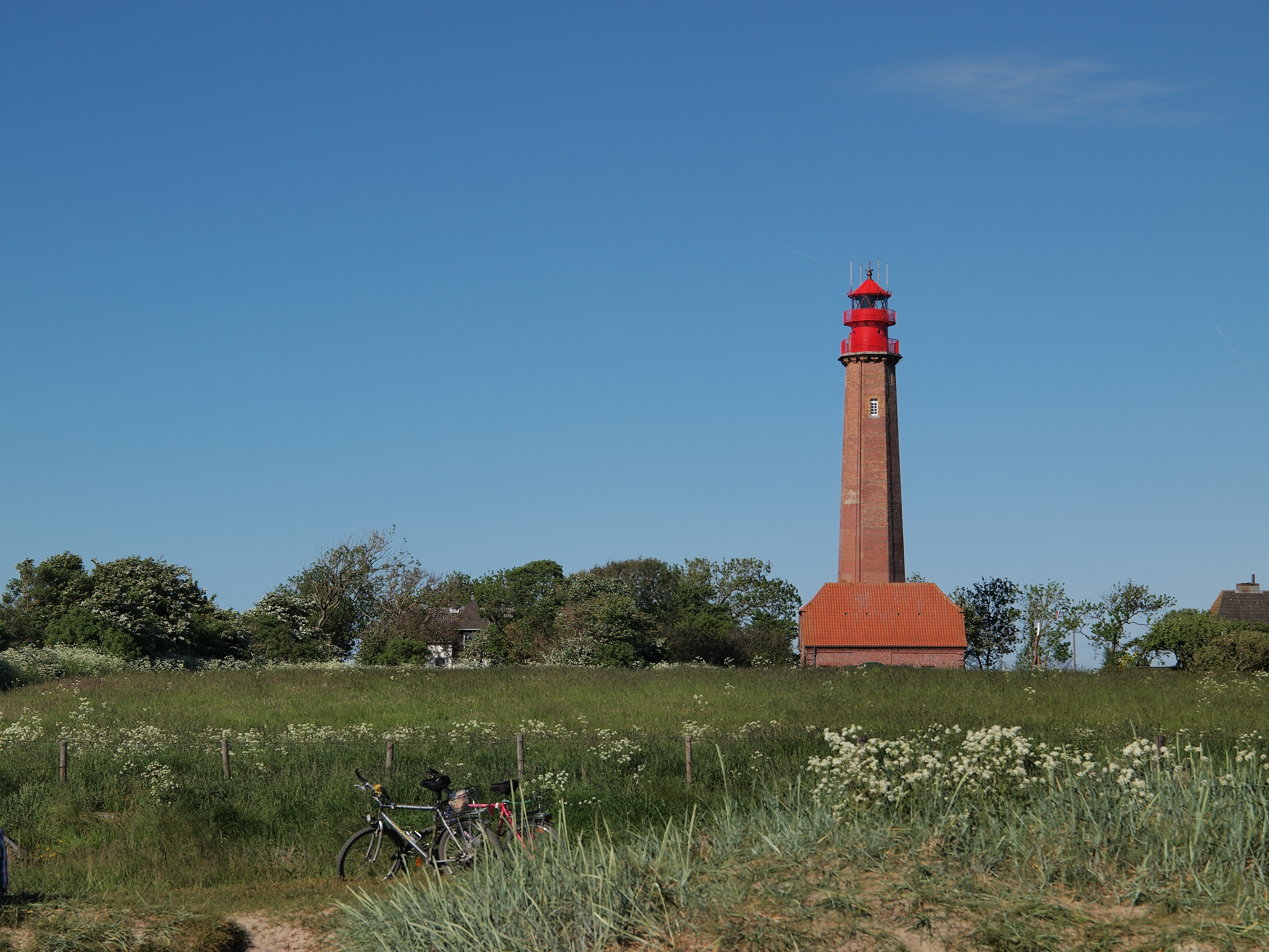 Leuchtturm Flügge an der Westküste der Insel Fehmarn, Ansicht von WSW